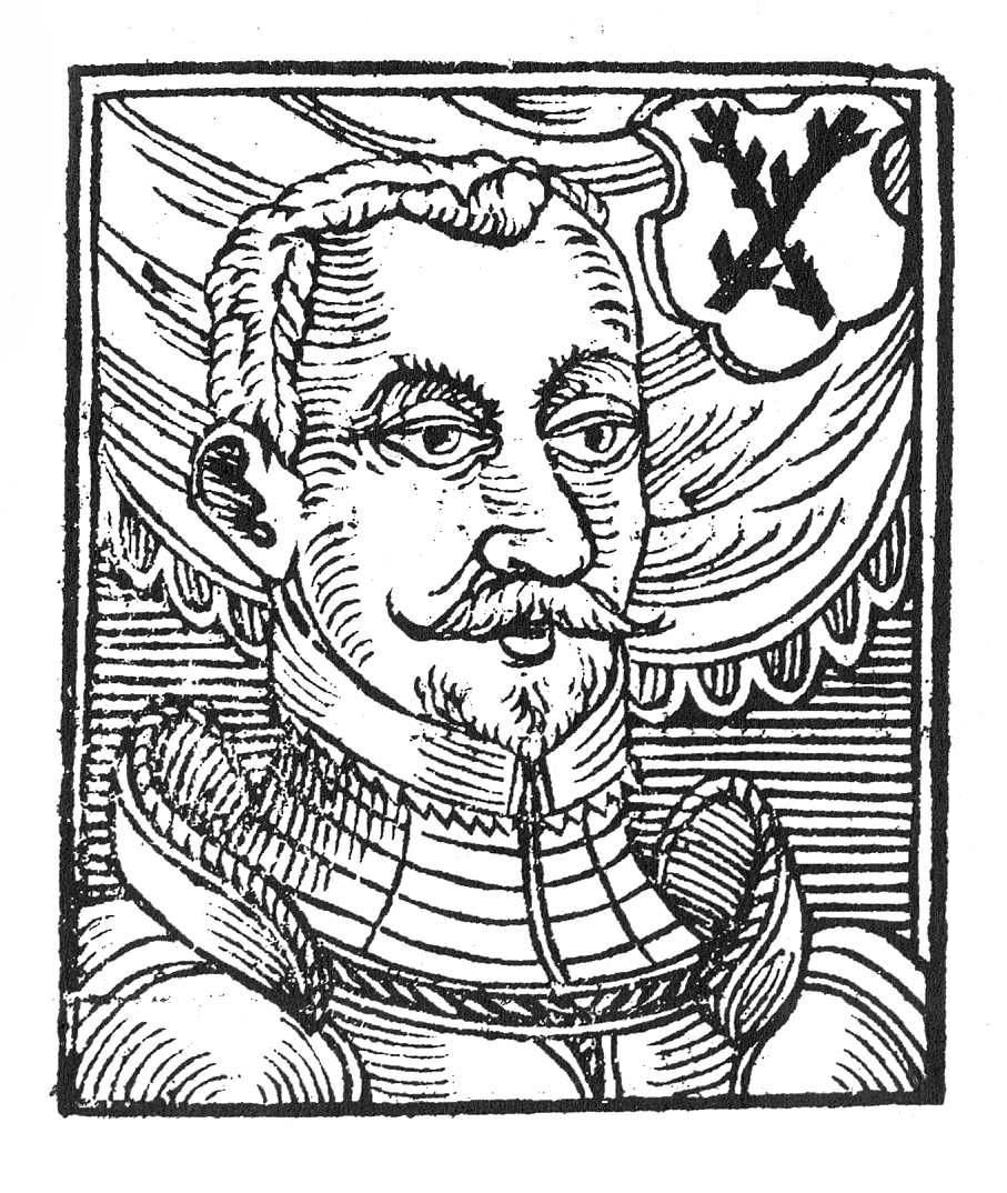 Fiktivní portrét Rajmunda z Lichtenburka od Bartoloměje Paprockého, Diadochus